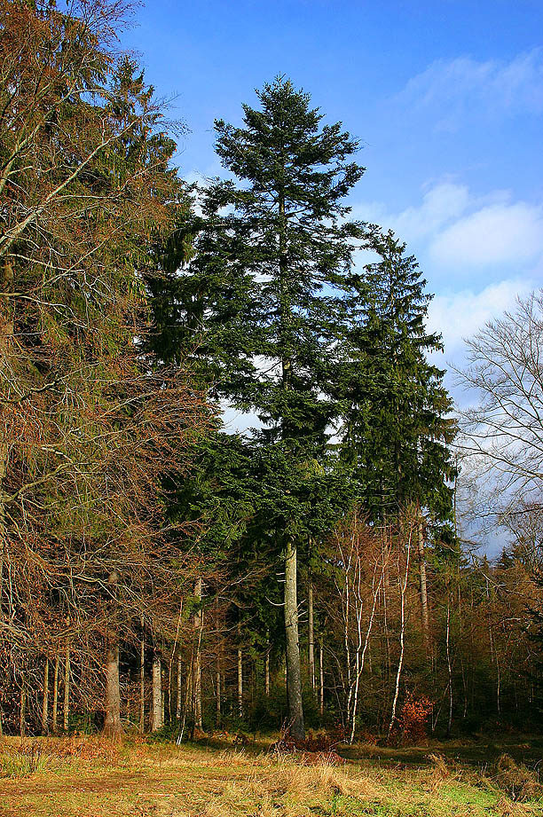 Ca. 60-jährige Weißtanne (Schleusinger Berg bei Suhl/Thüringer Wald). Aufnahmegerät: Canon EOS 300d